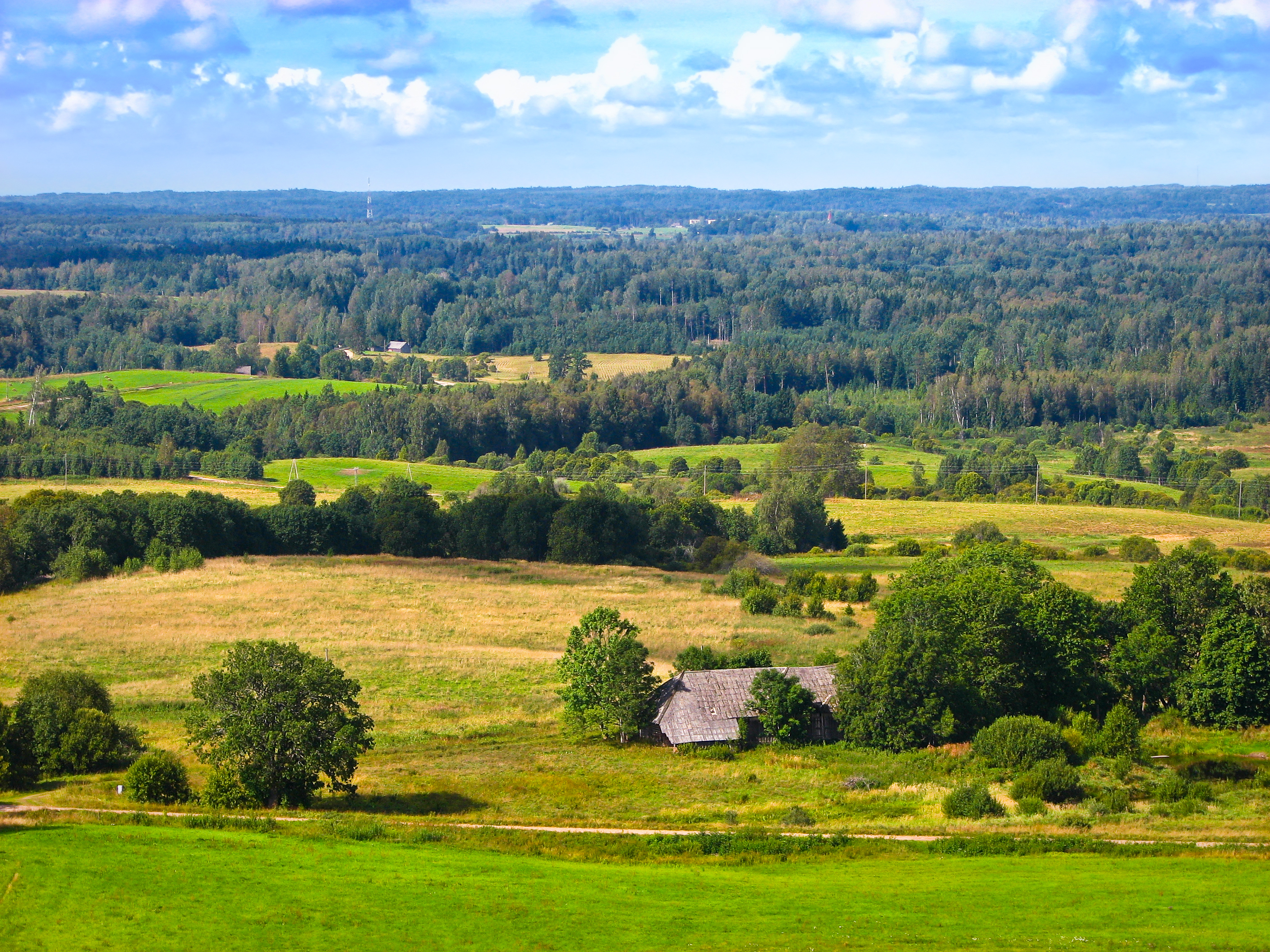 12. Вид на Cевер